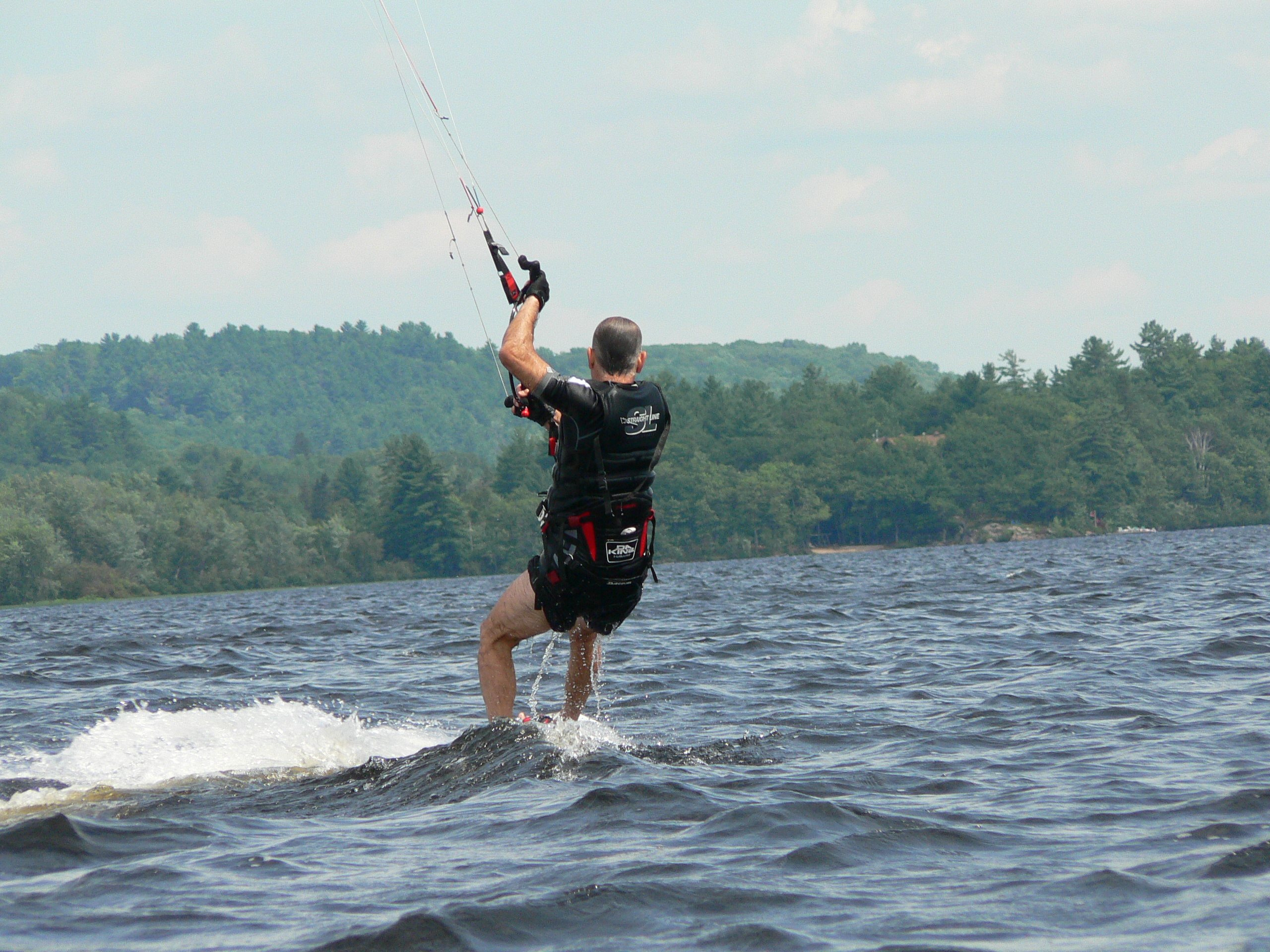 Kiteboarding